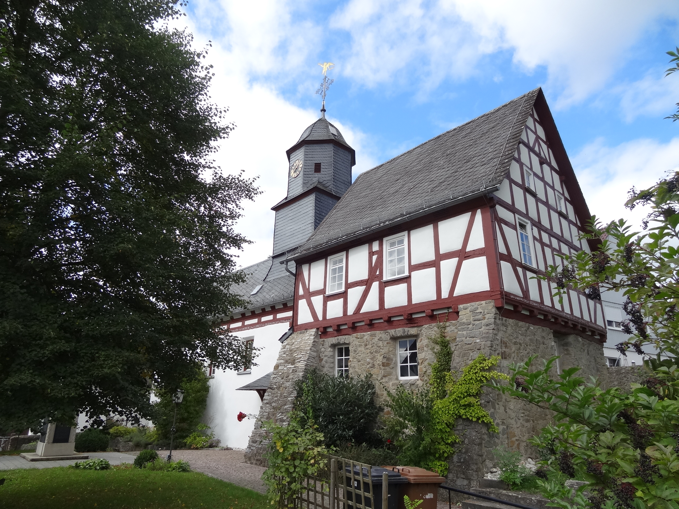 Evangelische Pfarrkirche Reiskirchen